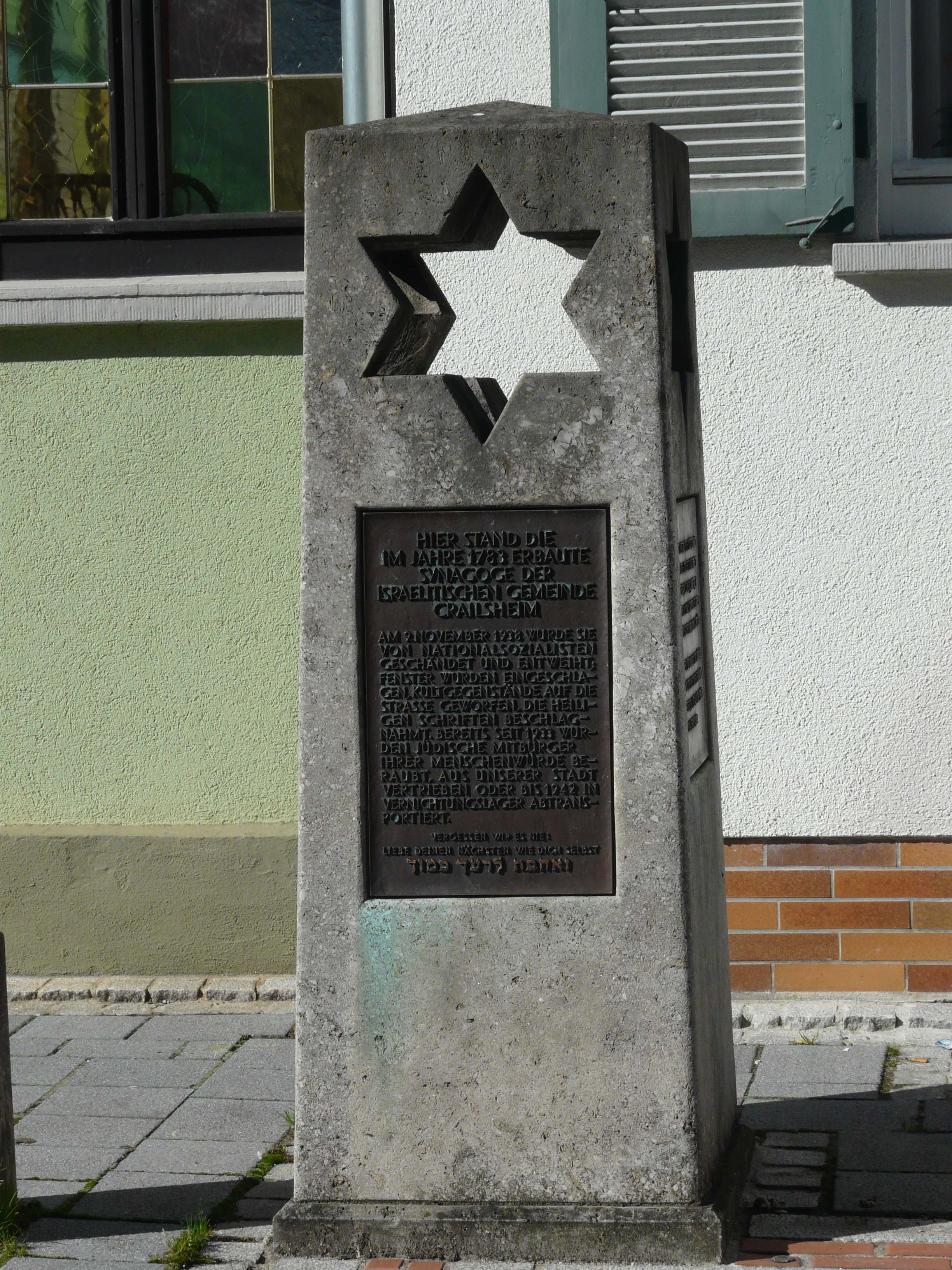 Crailsheim, Adam-Weiß-Straße, Gedenkstein am ehemaligen Standort der Synagoge